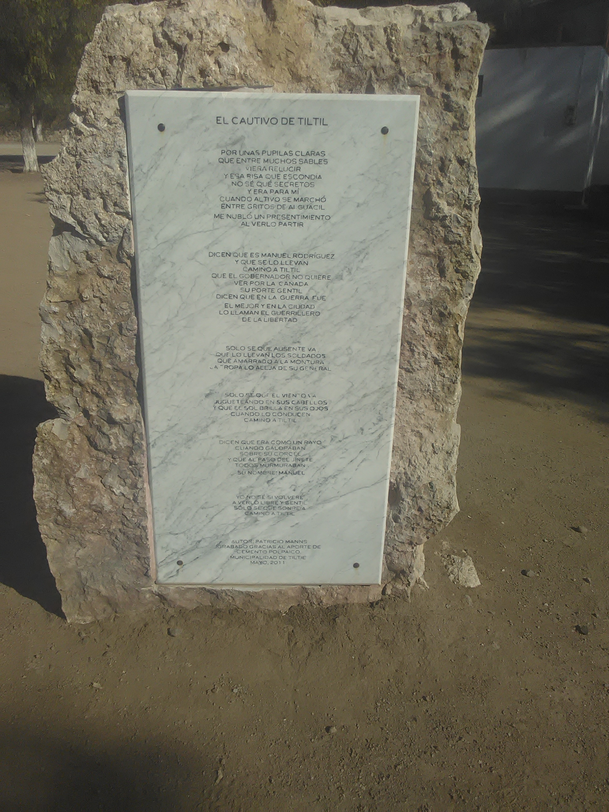 Poema a Manuel Rodríguez erigido en piedra junto al monumento